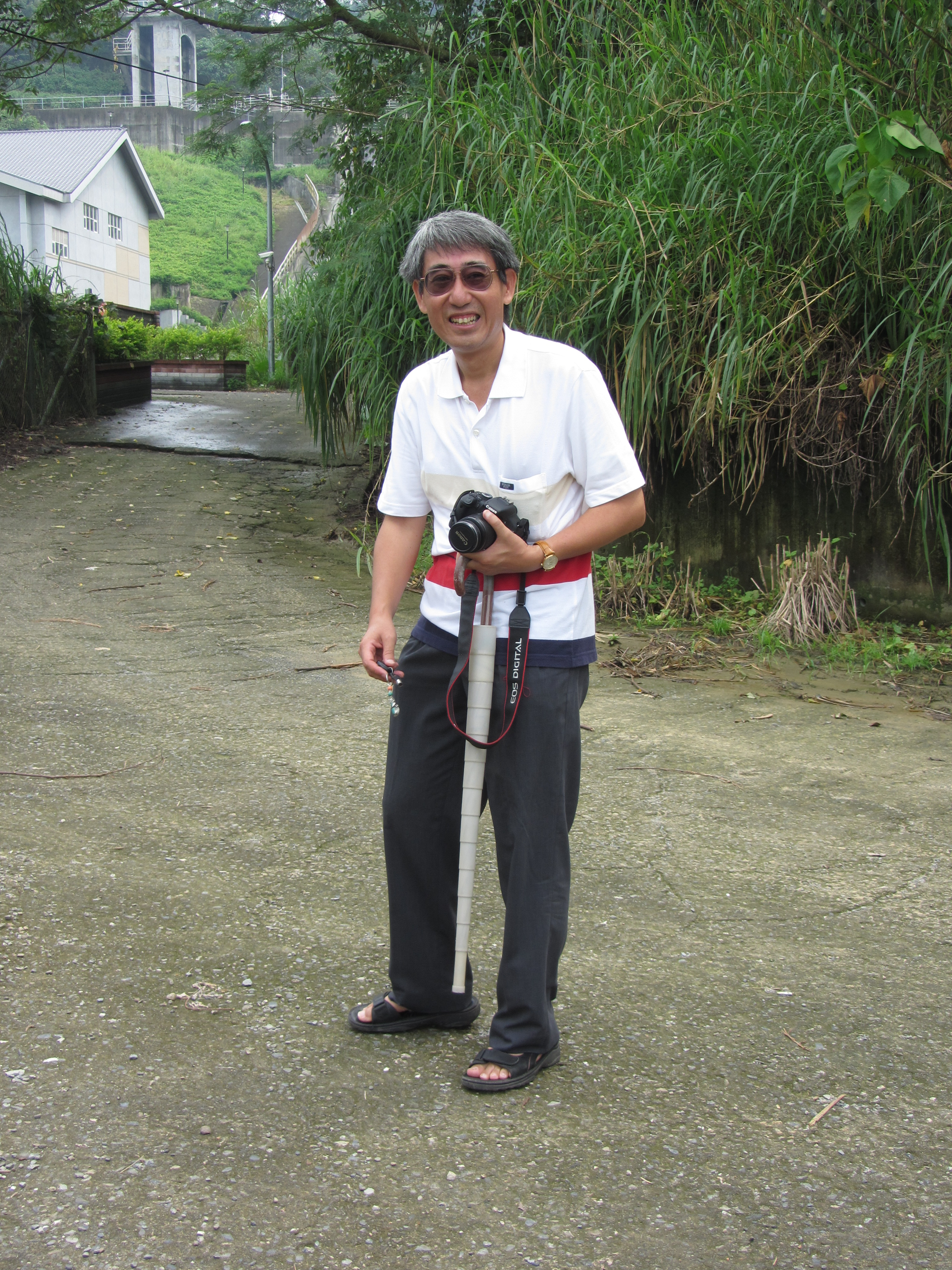 台灣鐵道研究者許乃懿醫師。